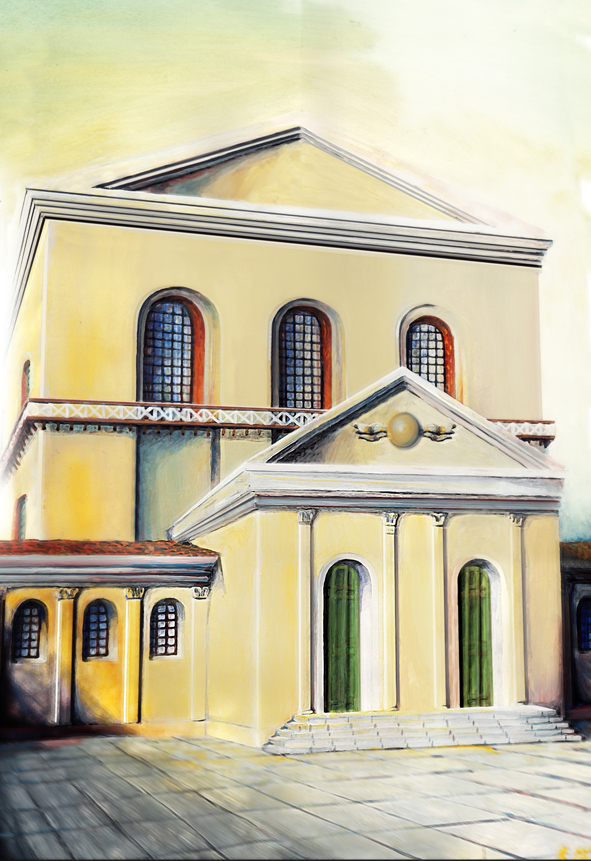 Von mir zu Studienzwecken 1987 in Tempera und Deckweiß auf Karton gemalte Rekonstruktion der Trierer Palastaula.